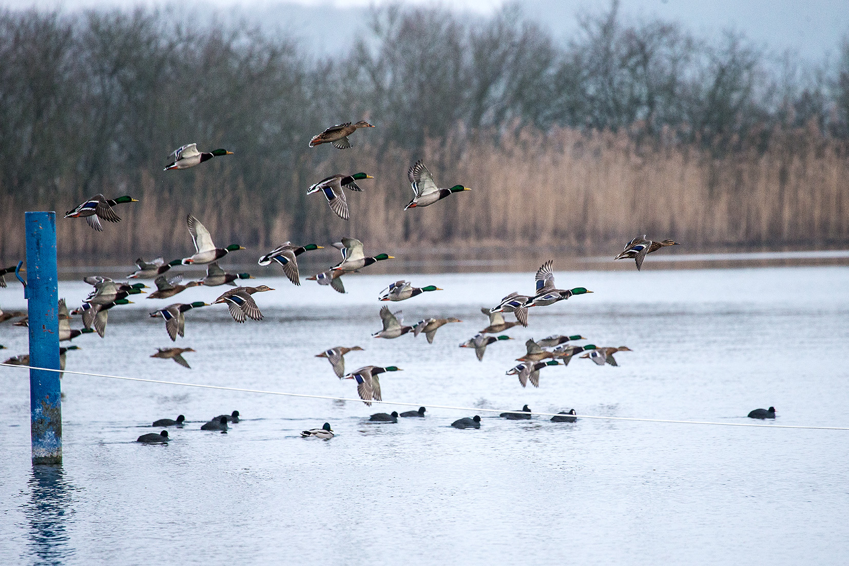 Vor Seeadler flüchtende Stockenten im Hafen von Ludorf, Müritz